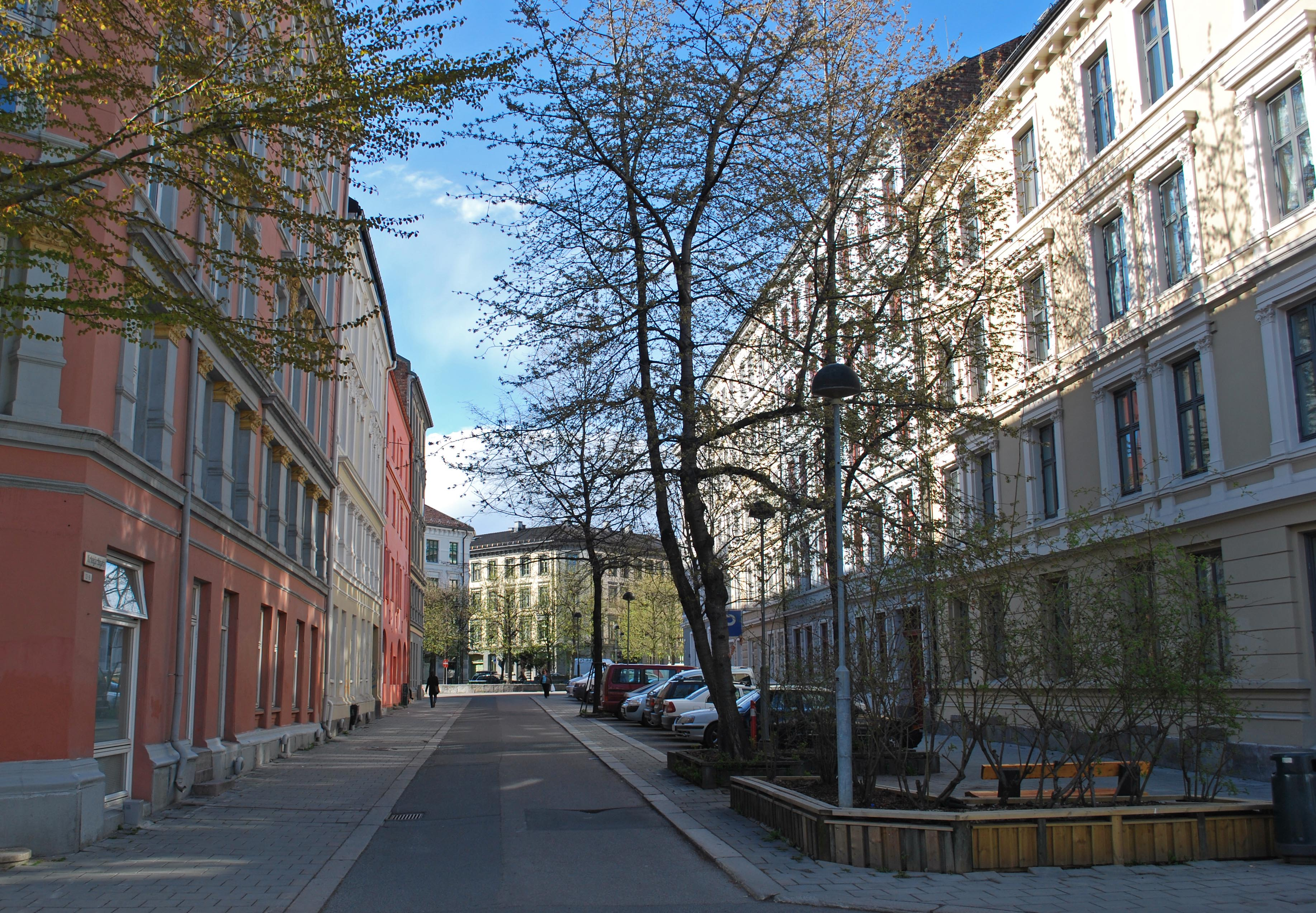 Kirkegårdsgata sett fra Sverdrupos gate mot Ratkhes plass, 10. mai kl. 16.30. Bildet viser skyggevirkning av fire og fem etasjer (nærmest til venstre)